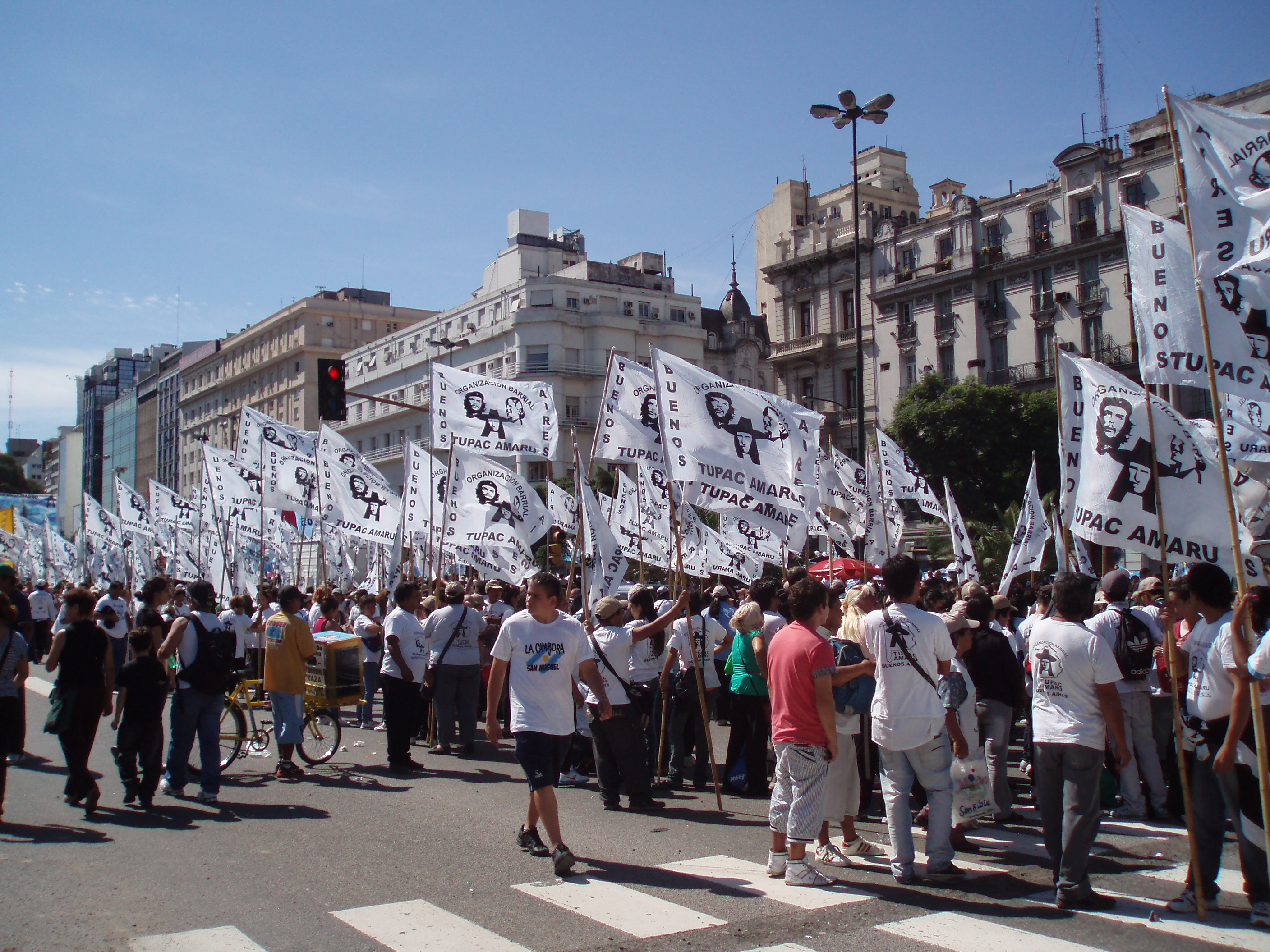 Columna de la Organización Túpac Amaru en el 24 de marzo de 2013, Buenos Aires.